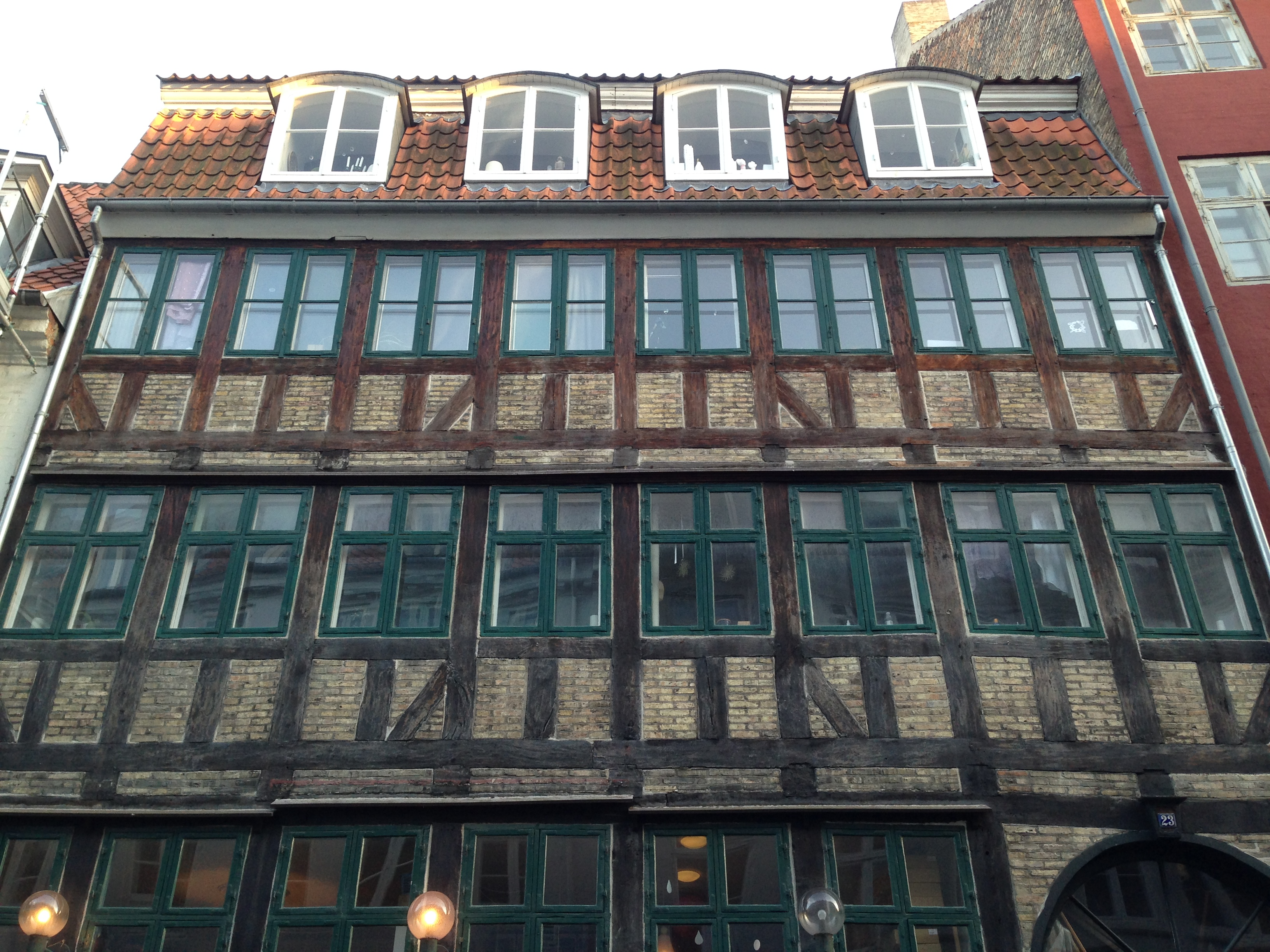 Kompagnistræde 23 in Copenhagen, Denmark